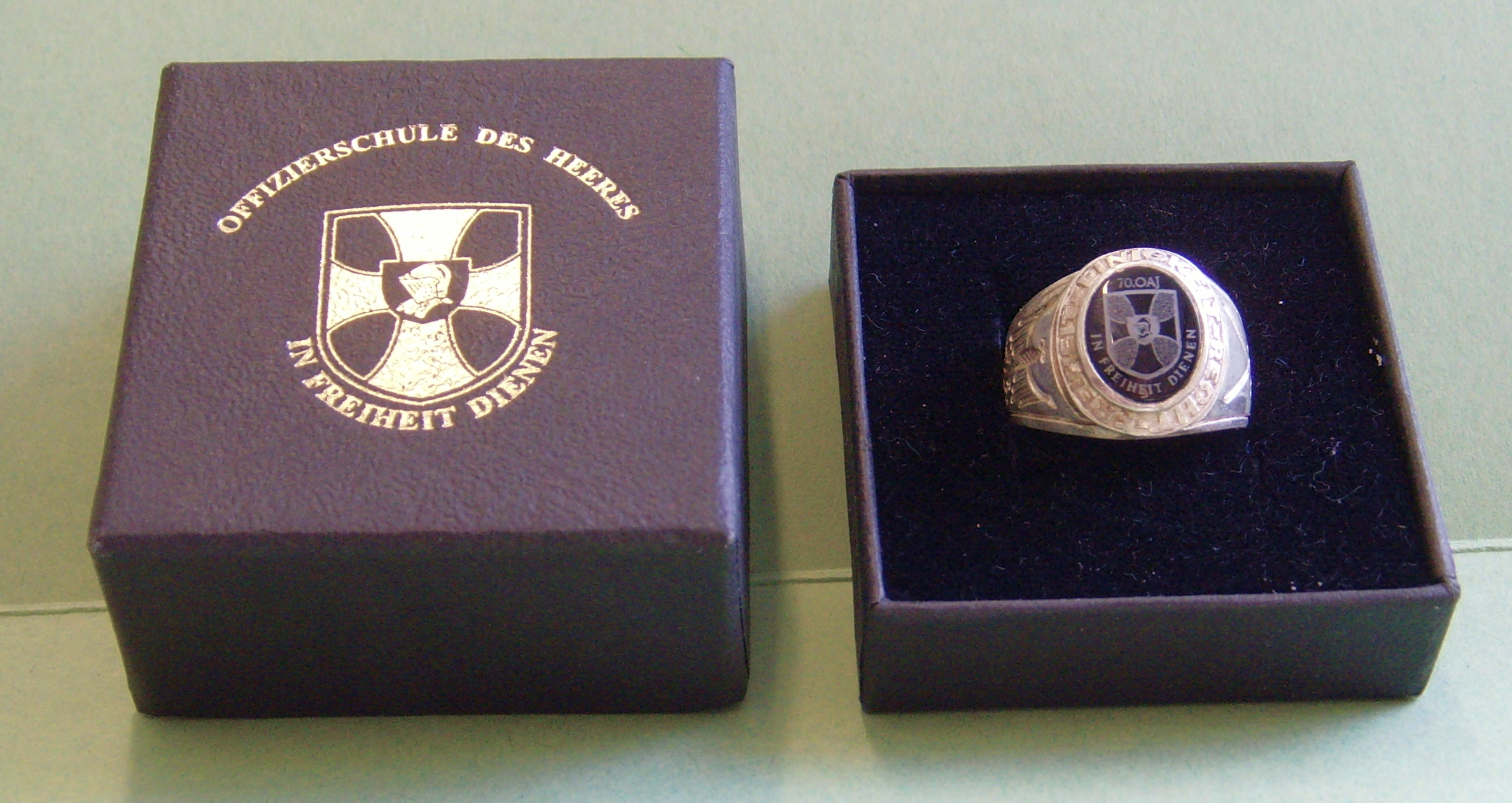 Jahrgangsring der Offizierschule des Heeres für den 70. OAJ, Ringnummer 70301657